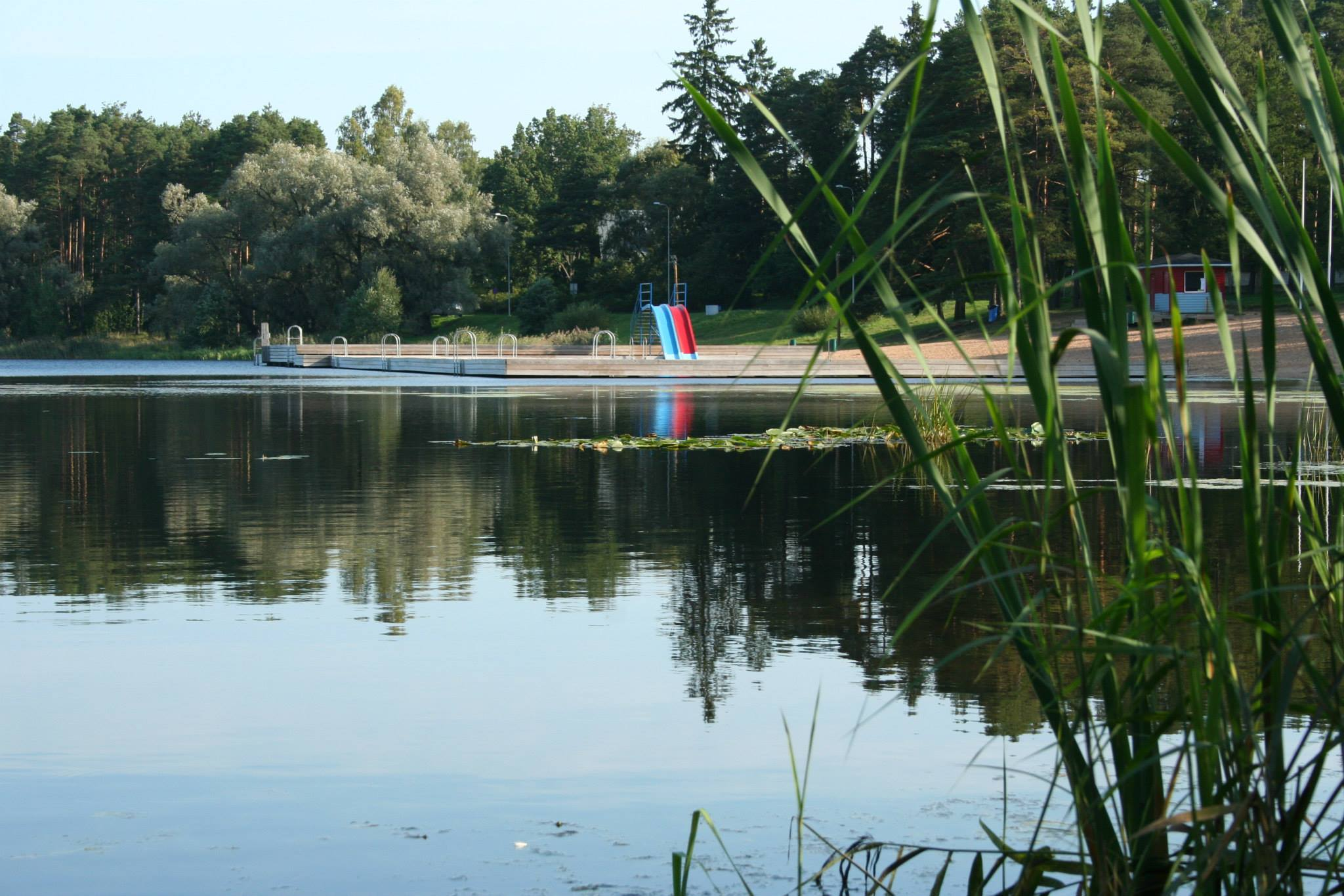 Verevi järve purre